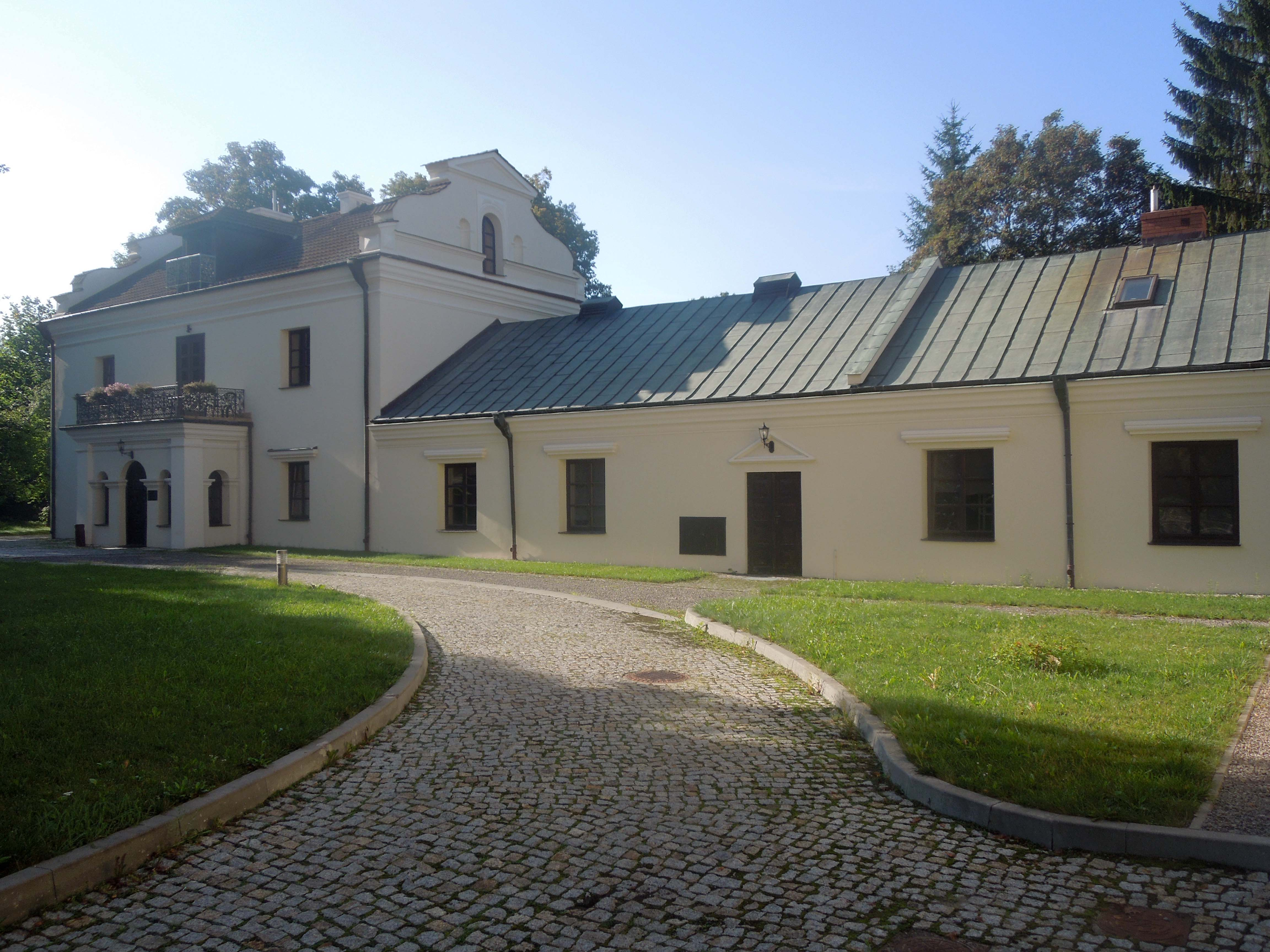 Gardzienice - Oficyna